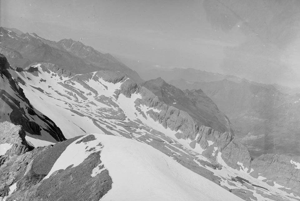 Imatge